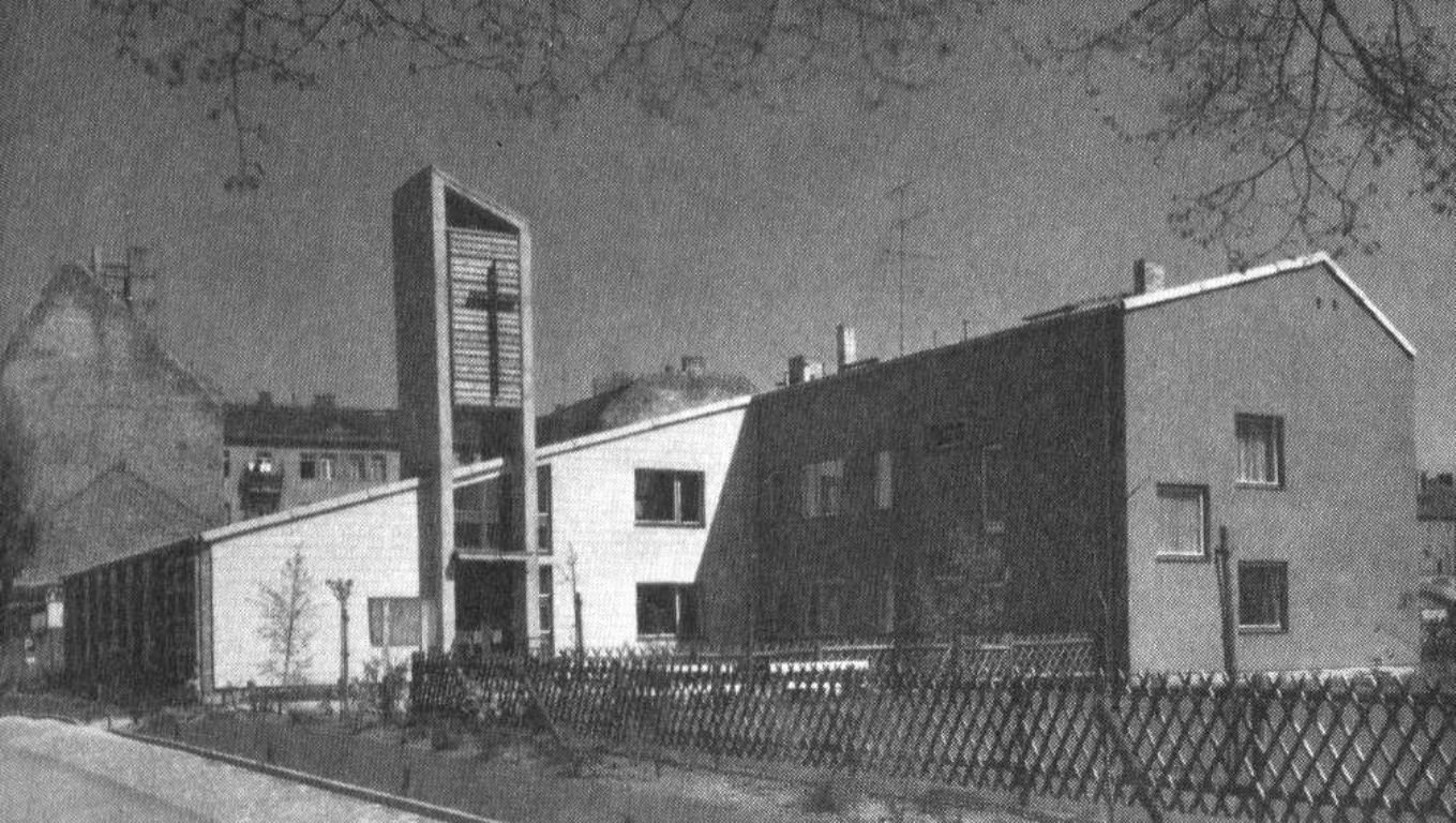 Historische Abbildung des Gemeindezentrums